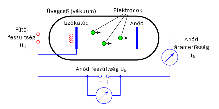 Vákuumcsöves dióda